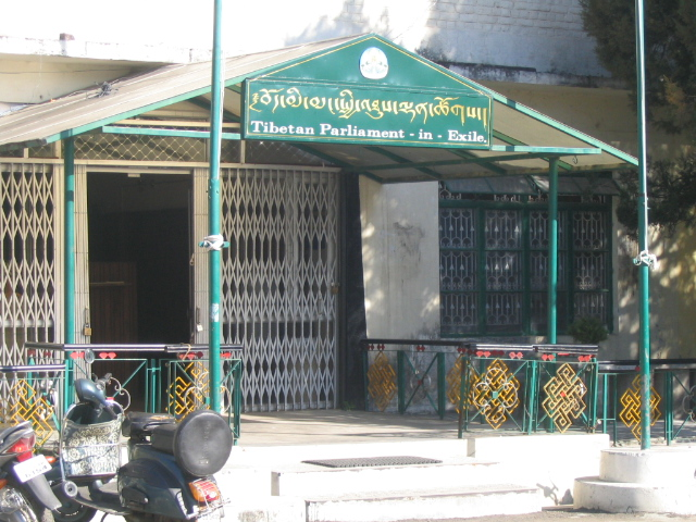 Ekzilita tibeta parlamento, Dharamsala, Barato